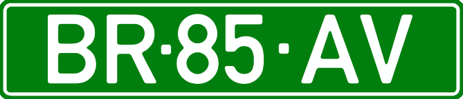 Номерний знак Кабо-Верде